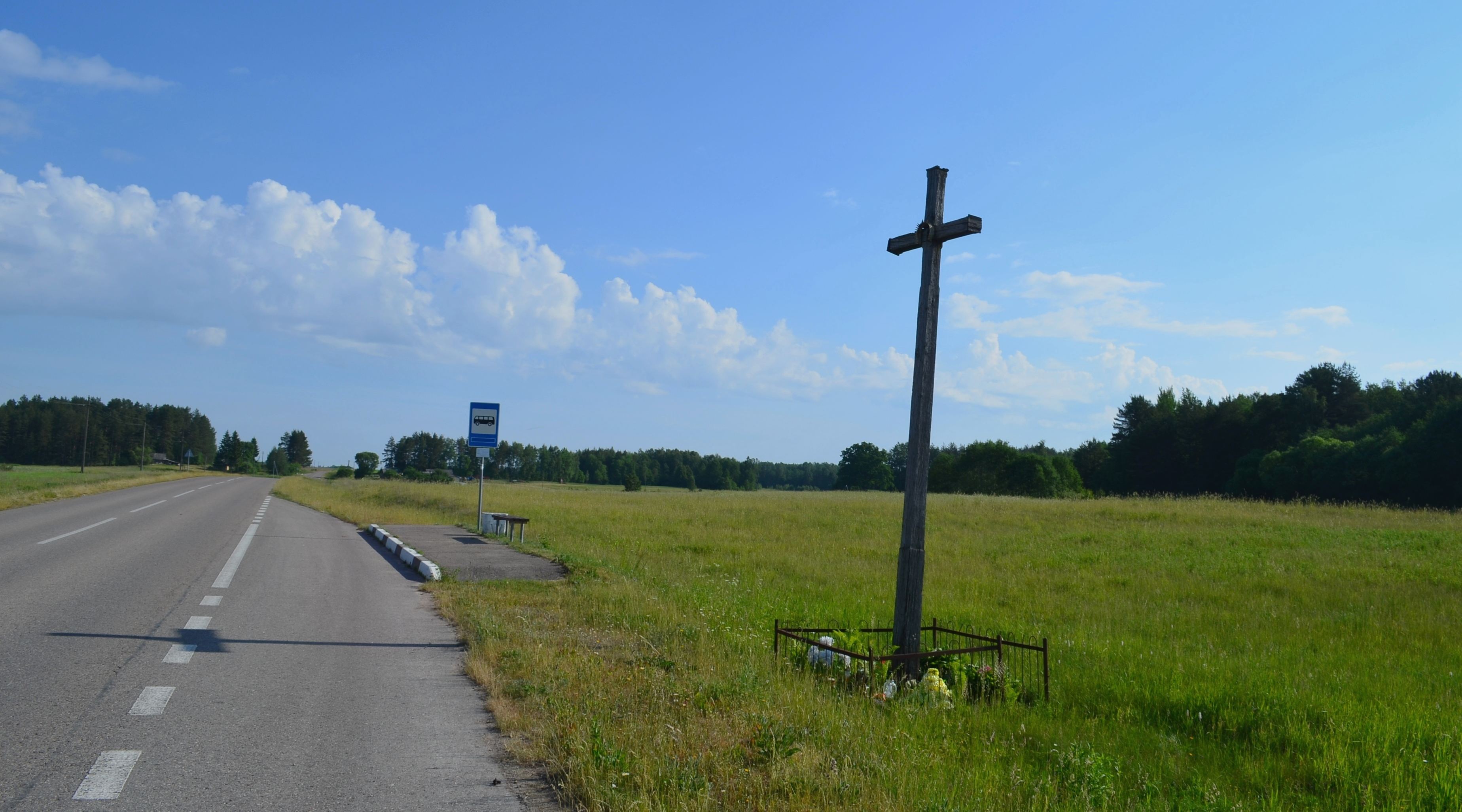 Kryžius, Aleksandriškės, Vilniaus raj.